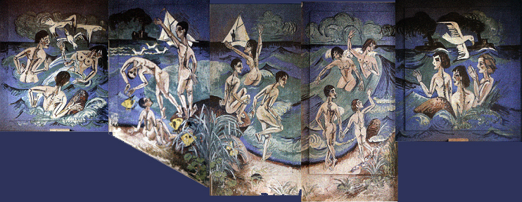 Die 5 Wandbilder zusammengefügt (von links nach rechts fortlaufend), die durch den Treppenverlauf bedingten, zum ganzheitlichen Rechteck fehlenden Teile im blauen Grundton eränzt. Die 5 Wandbildteile gescannt aus dem Katalog S. 226-227: Ernst Ludwig Kirchner, Badeszenen im Brunnenhaus des Sanatoriums in Königstein, 1916, (Wandmalereien (zerstört), Höhe zw. 229 und 440cm, Farbfotografien von Franz Schilling, Königstein im Taunus, 1926